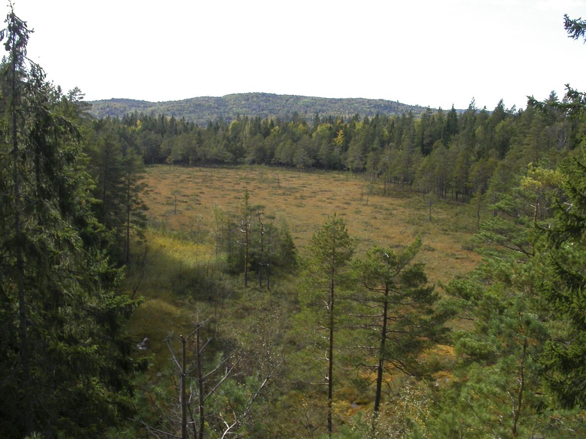 Nordre Skarsholttjern.